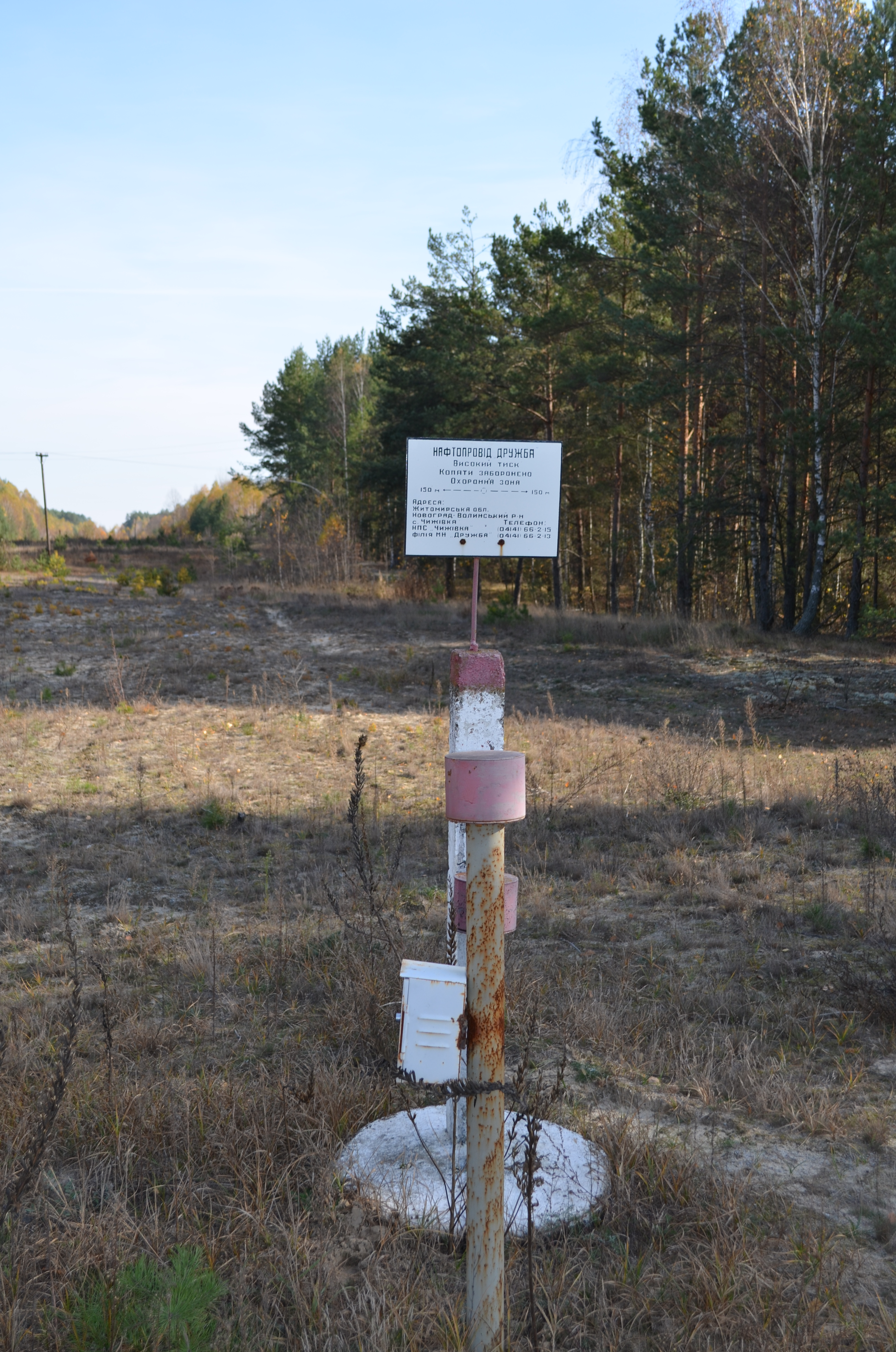 Нафтопровід "Дружба"